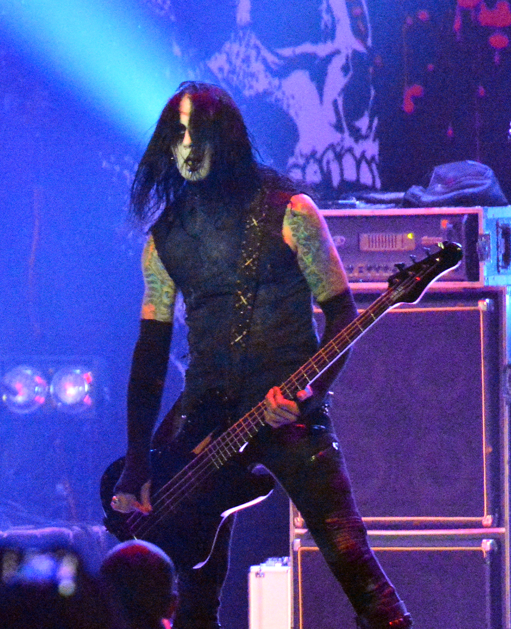 Combichrist beim Wacken Open Air 2015